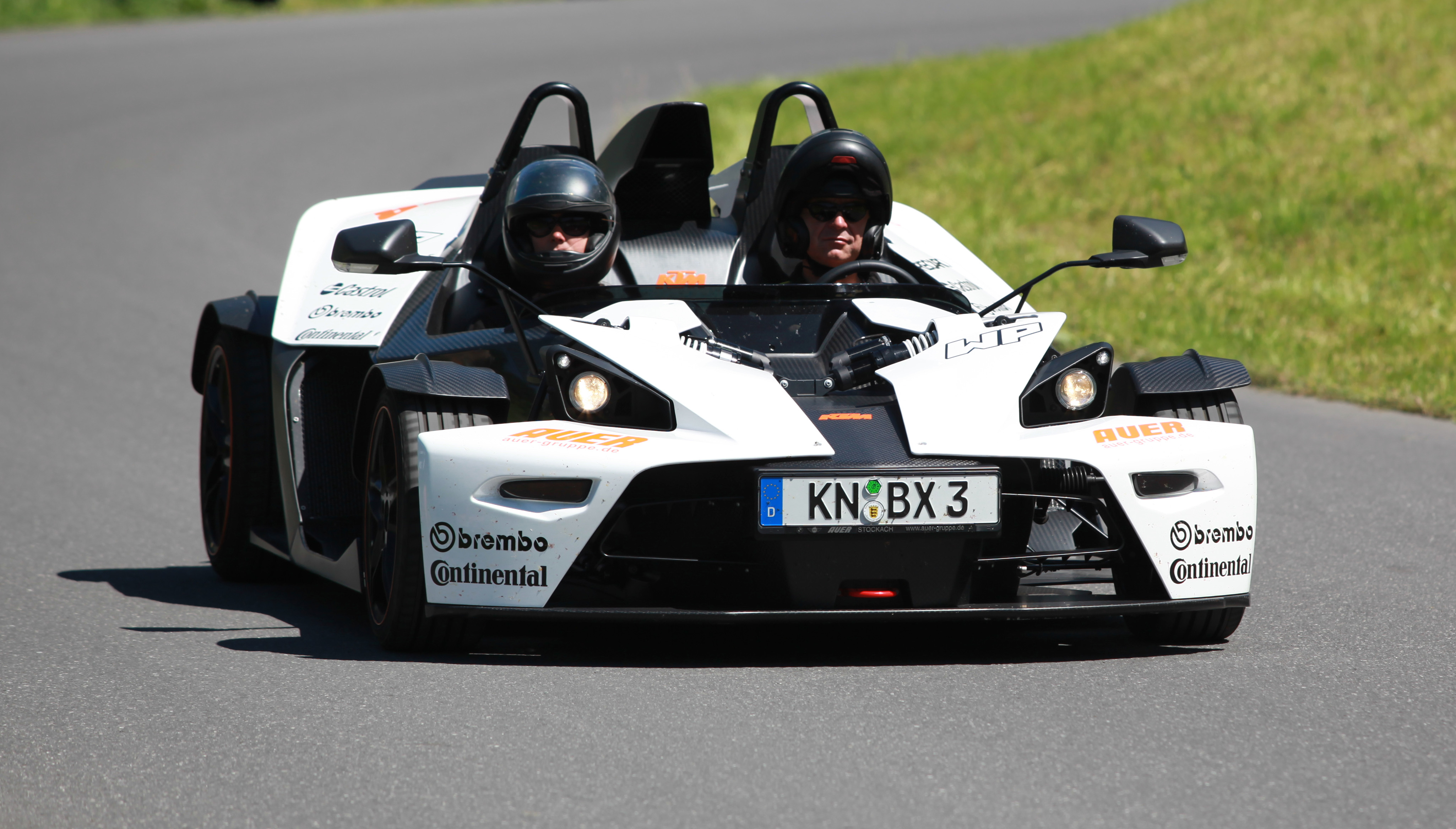 Ein KTM X-Bow in Grindelwald (Schweiz).